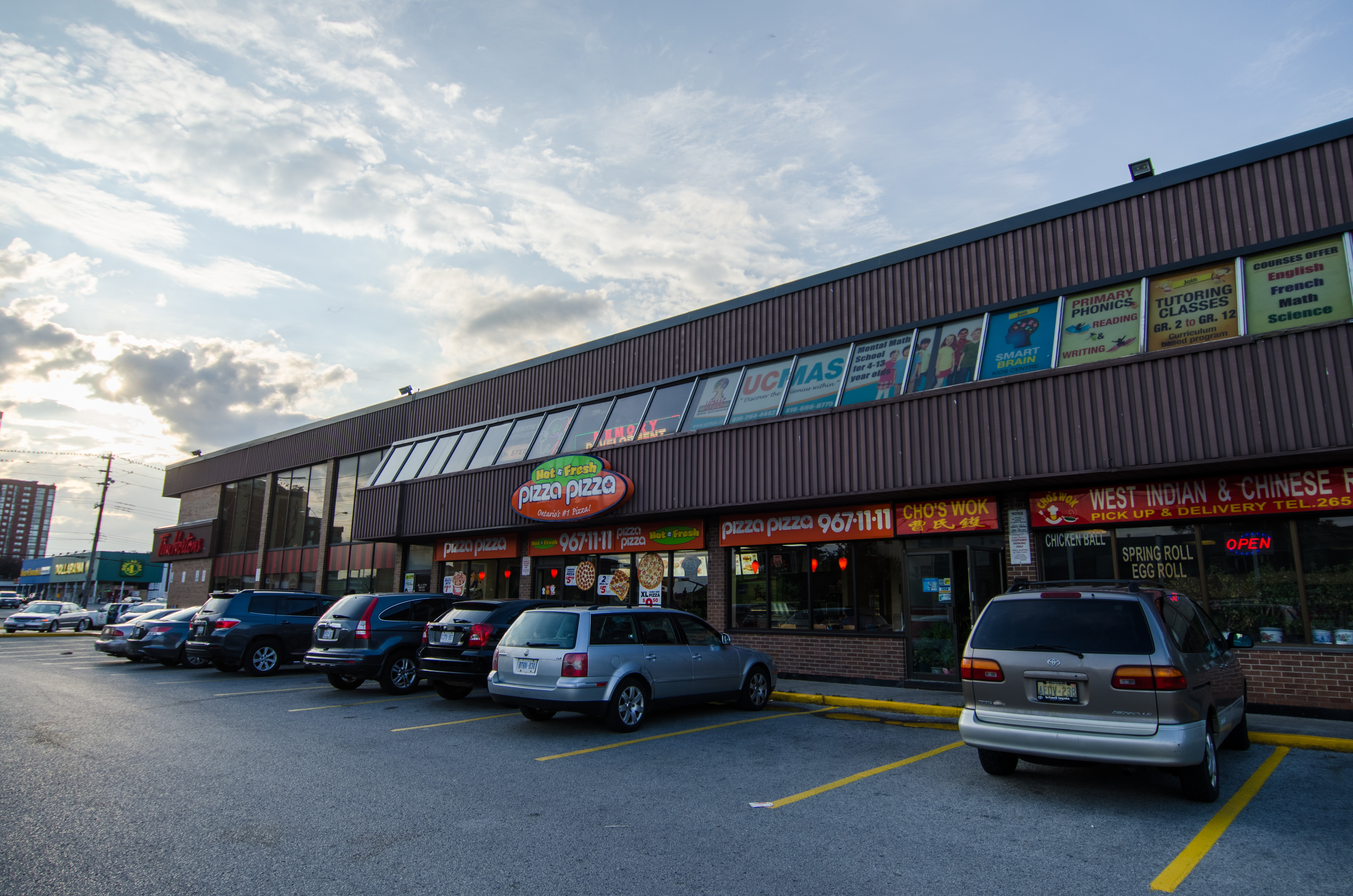 Seen in Strange Brew.